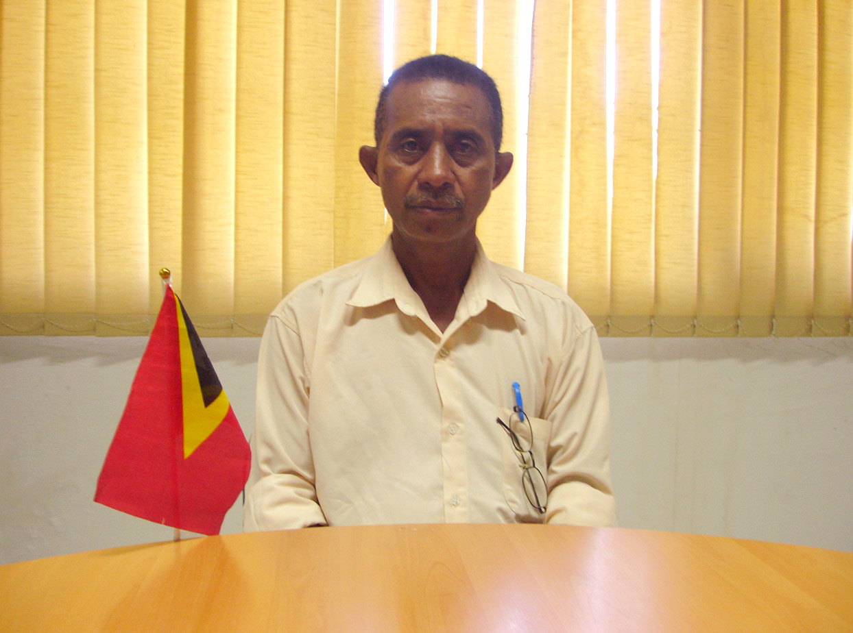 Francisco Guterres, Administrator des Subdistrikts Suai